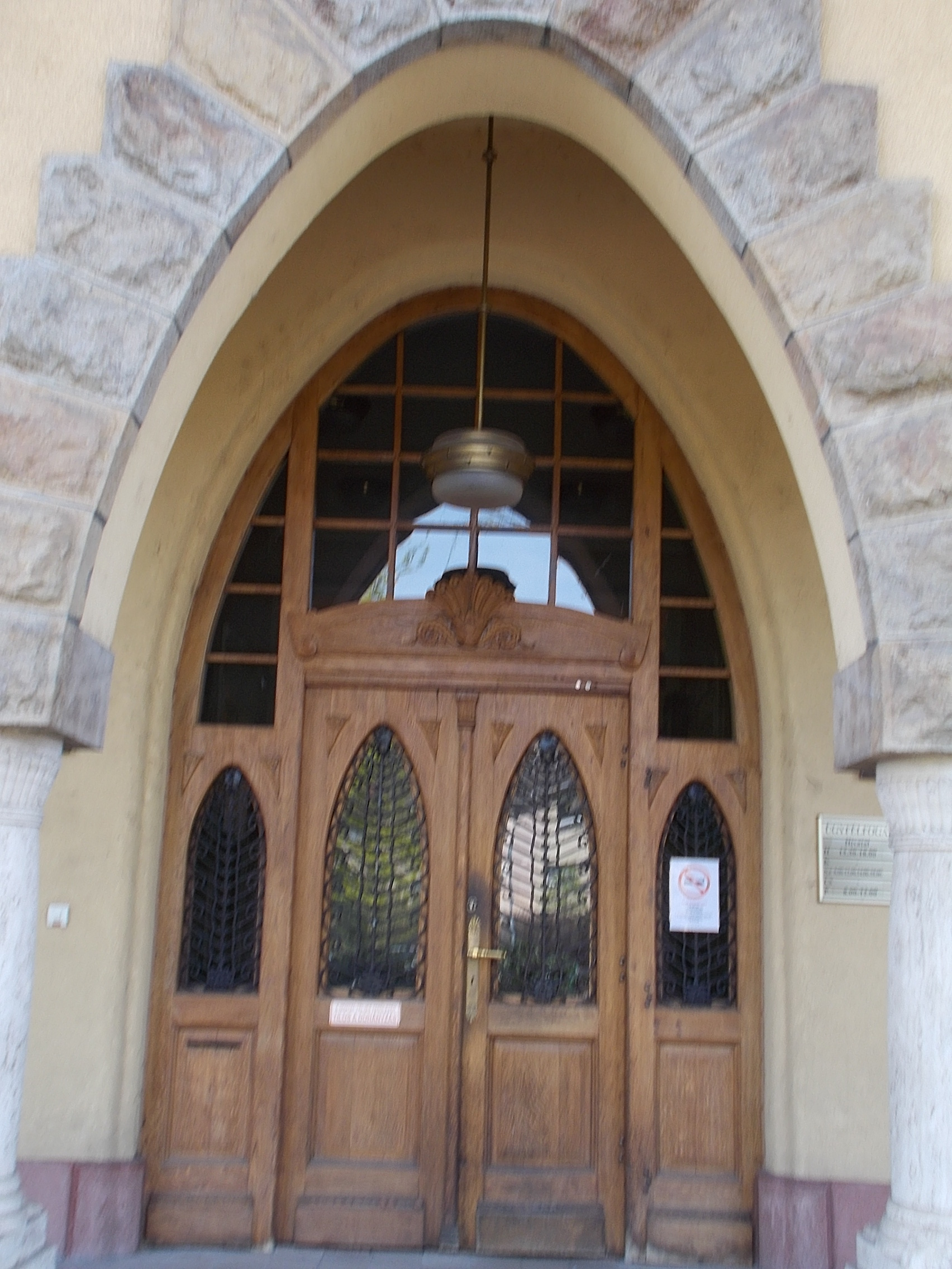 Budafoki városháza; Polgármesteri Hivatal műemlék épülete. Főbejárat. - Budapest, 22. kerület. Budafok. Városház tér